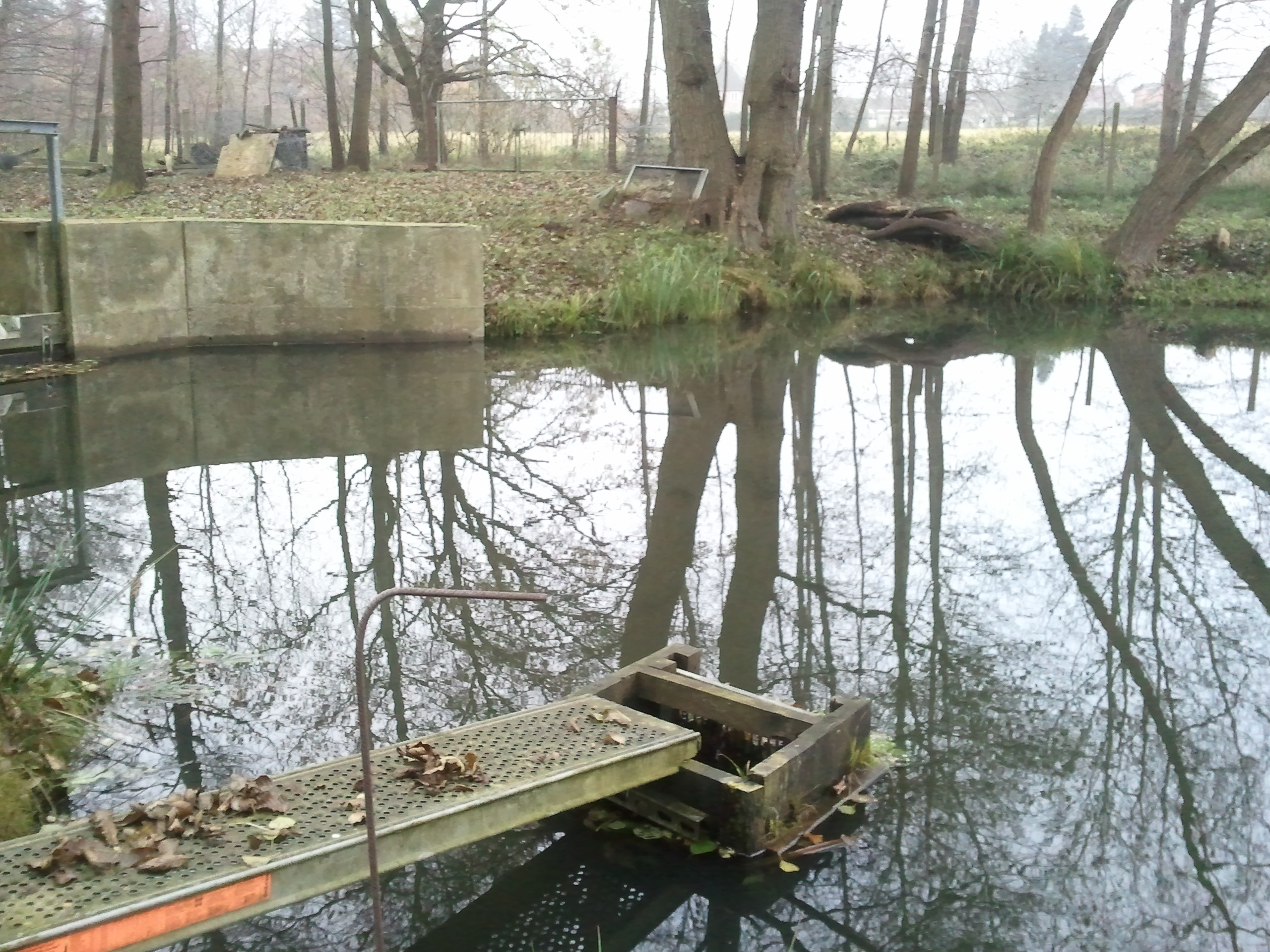 Abflussvorrichtung im Teich bei Slate (Parchim).